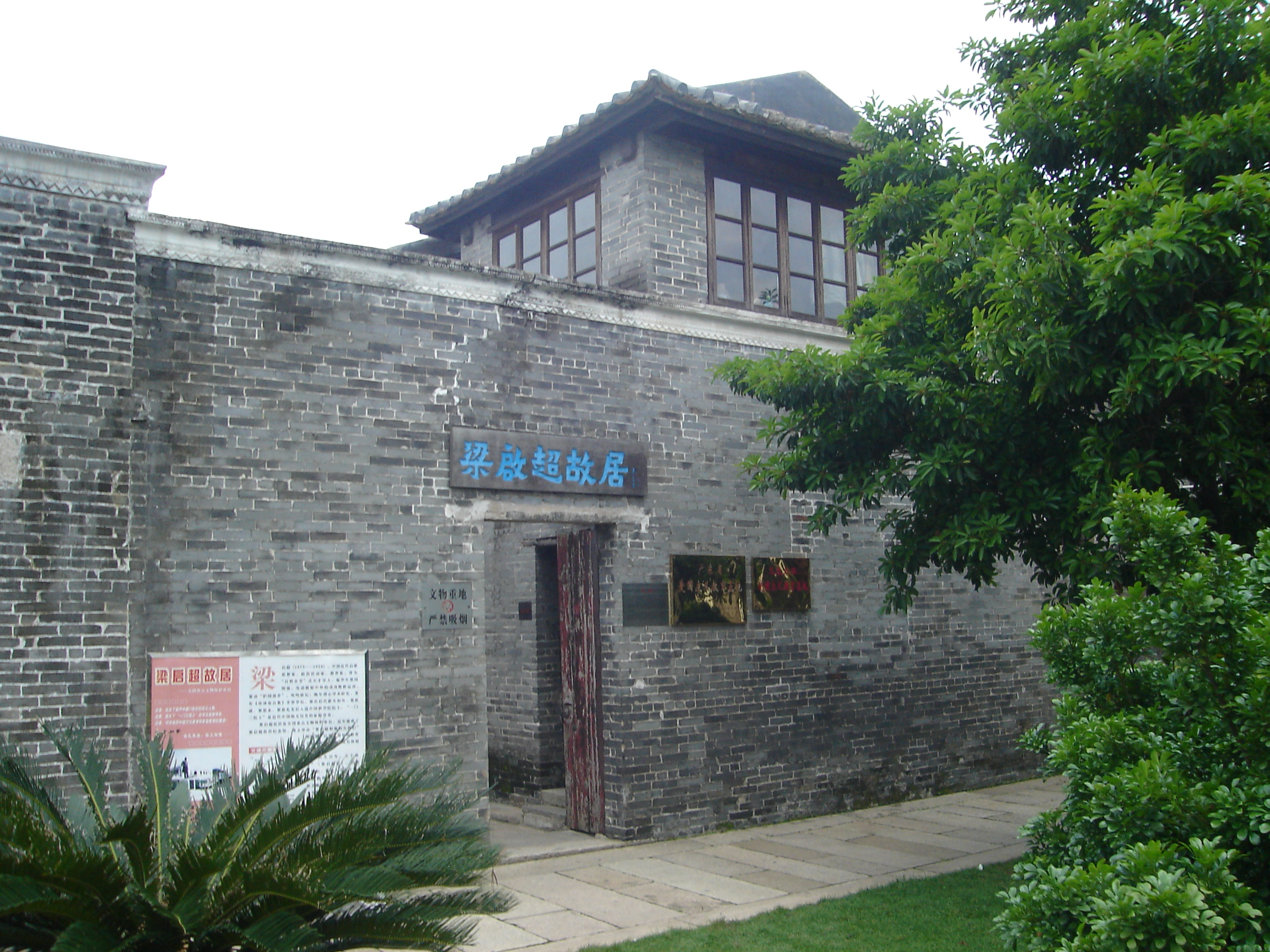 位于江门市新会区的梁启超故居